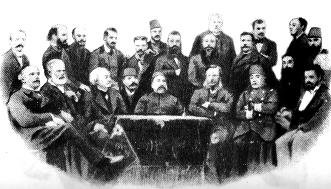 مؤتمر القسطنطينية عام 1888